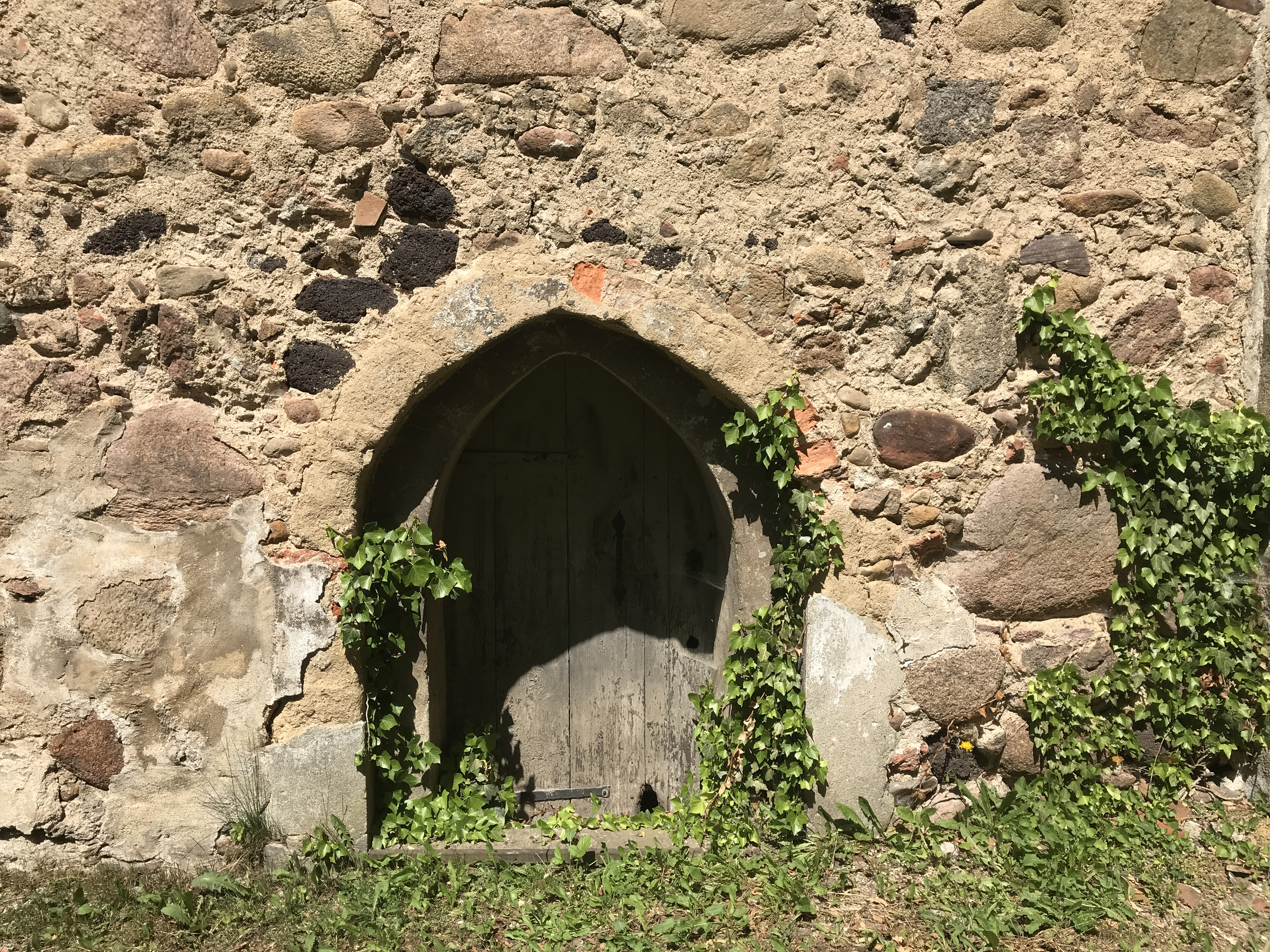 Die Dorfkirche in Kasel-Golzig wurde im 14. Jahrhundert errichtet und im 15. Jahrhundert um den Dachturm erweitert. 1722 erfolgte ein barocker Umbau.